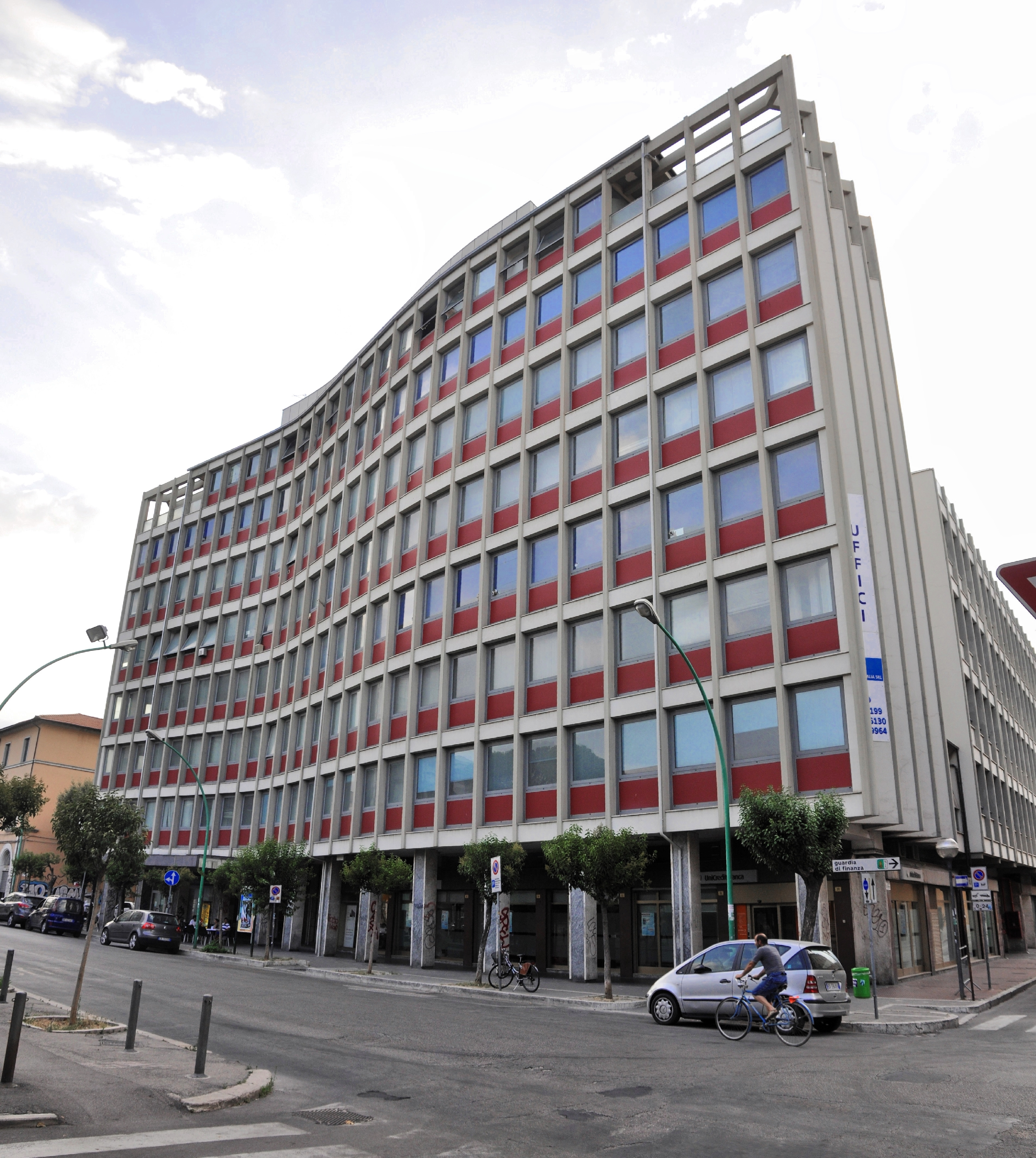 Pescara 2013